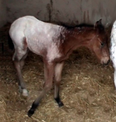 Arabský plnokrevník